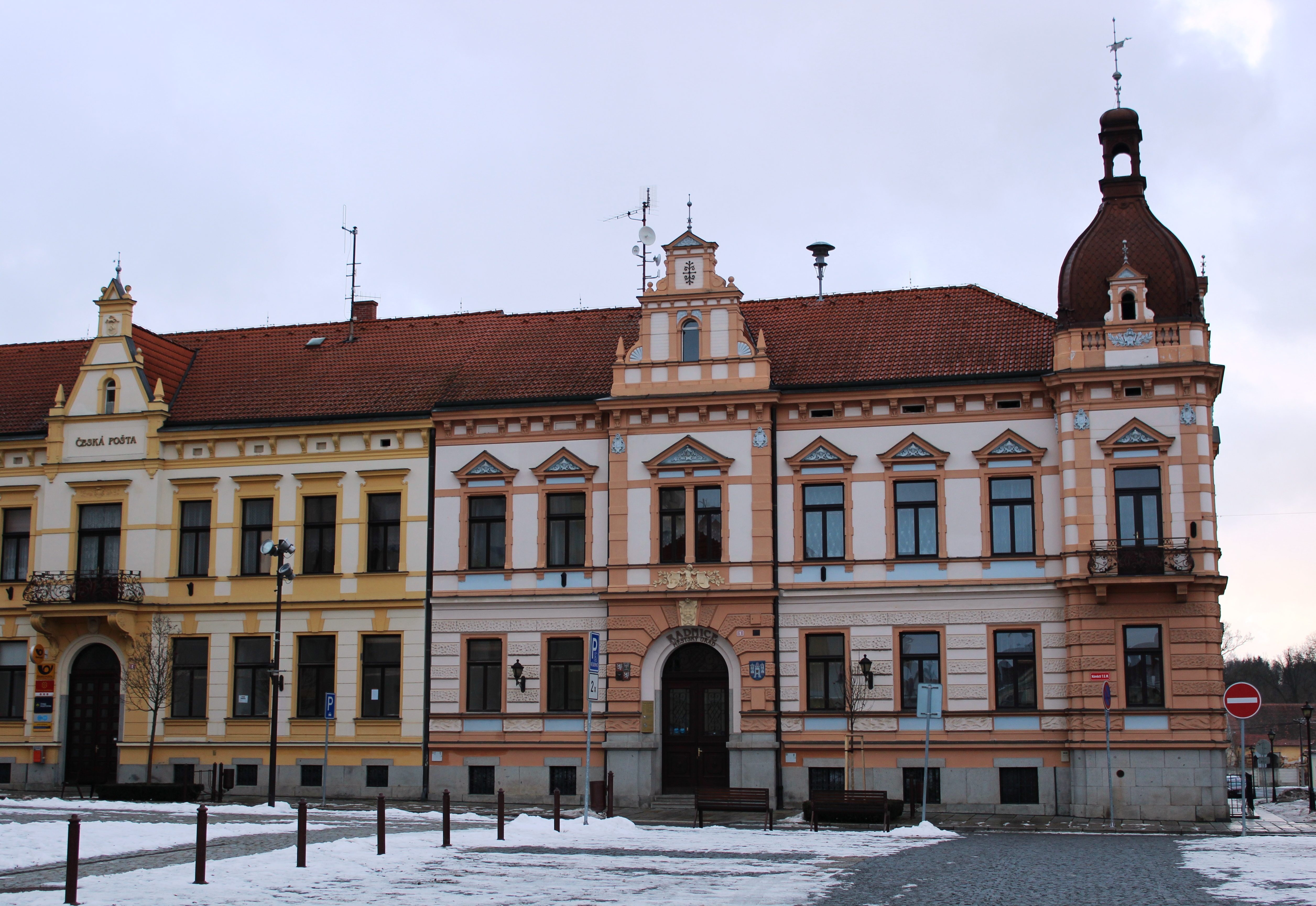 Radnice. Dobřany v okrese Plzeň-jih, kraj Plzeňský. Česká republika.